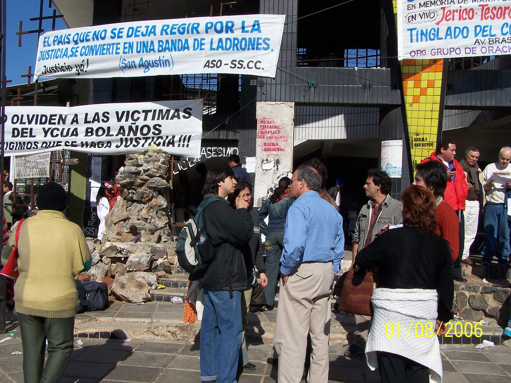 Visita de conmemoración del segundo aniversario en el siniestrado supermercado Ycuá Bolaños ubicado entre las Avenidas General Artigas c/ Santísima Trinidad en el barrio Trinidad de la ciudad de Asunción, Paraguay.